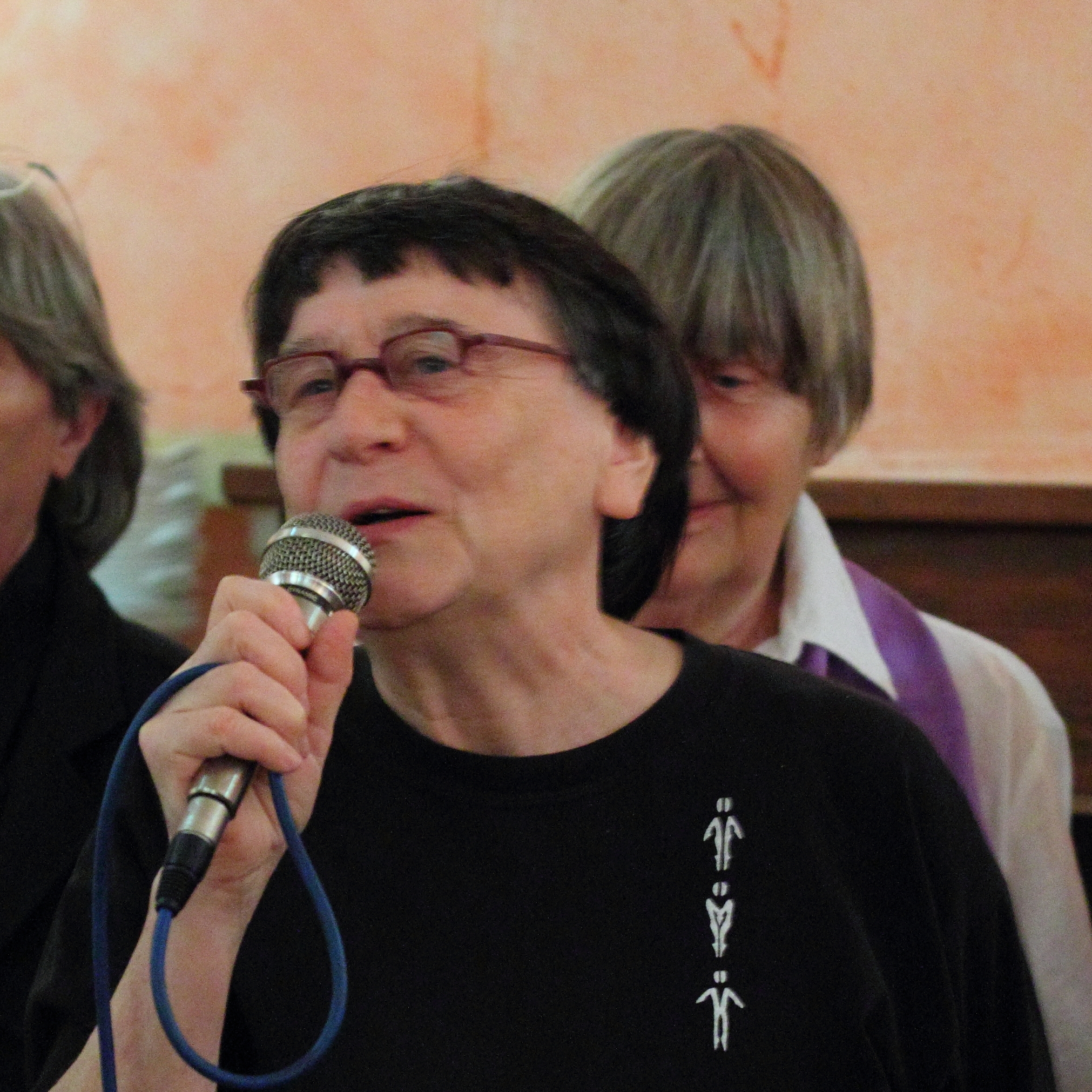 Brigitte Boucheron présentant les invitées de l'inauguration du 15ème printemps lesbien de Toulouse et rappelant l'histoire de celui-ci ainsi que de l'association Bagdam Espace Lesbien.